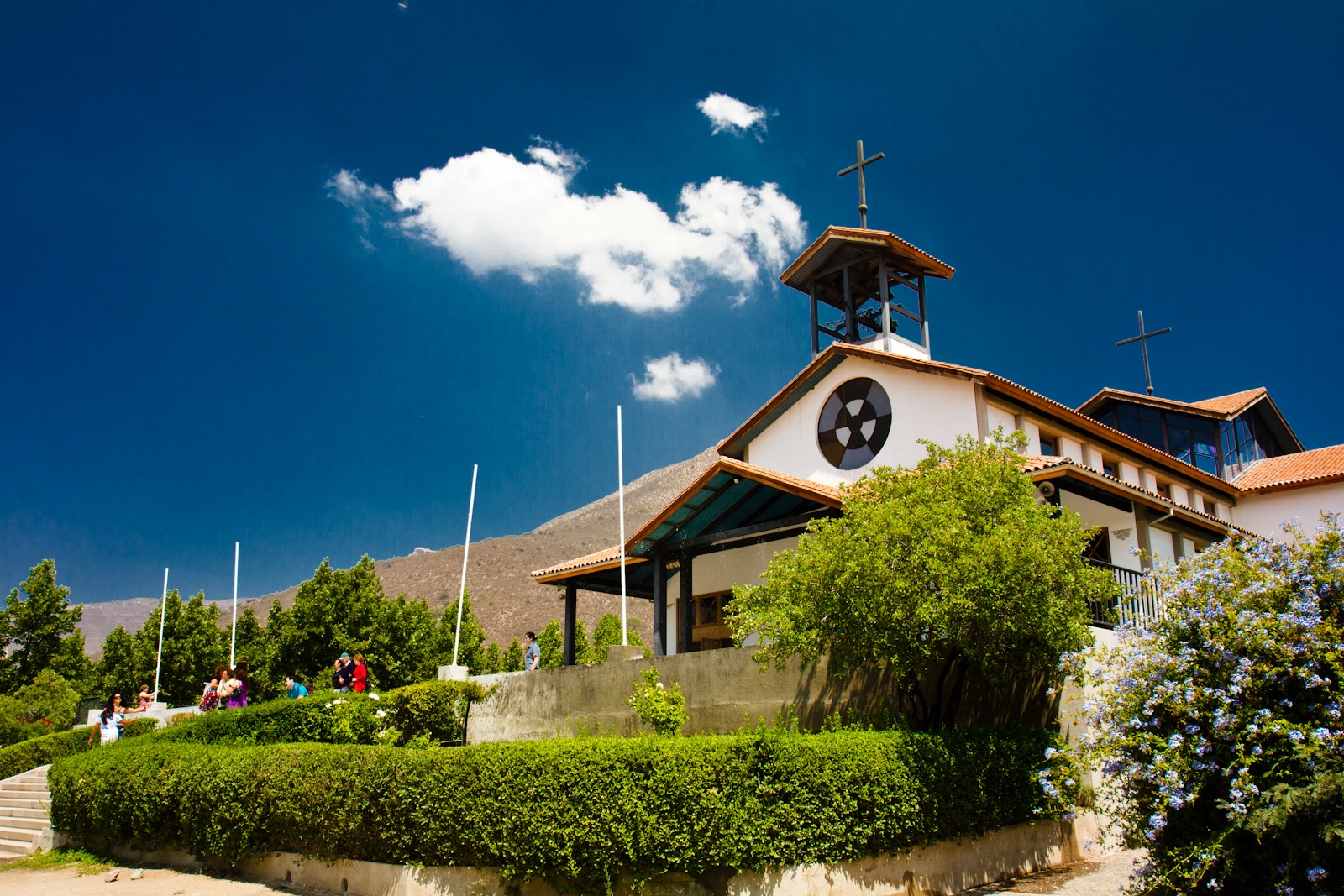 Santuario Auco-015